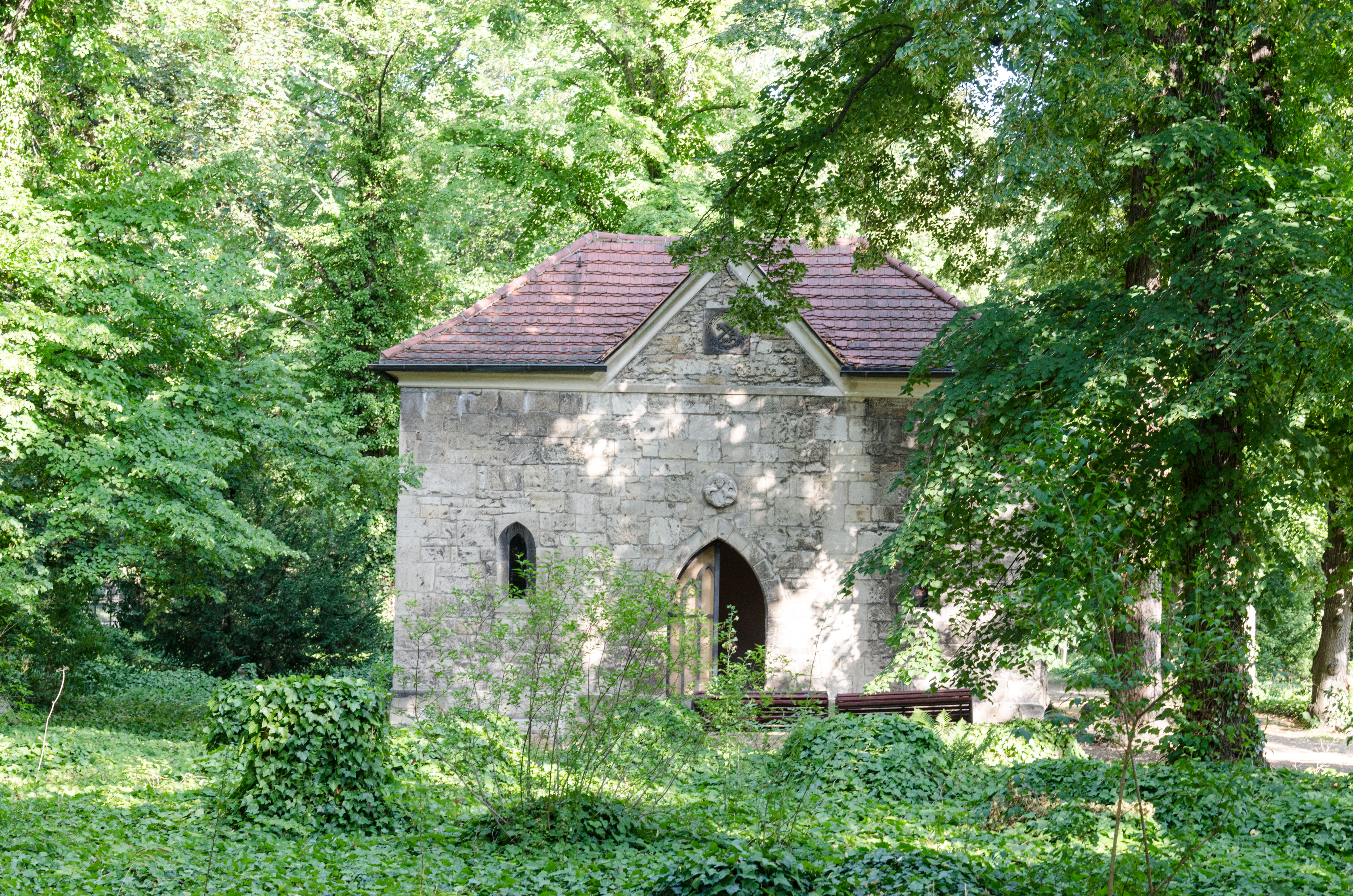 Naumburg, Windmühlenstraße, Domfriedhof